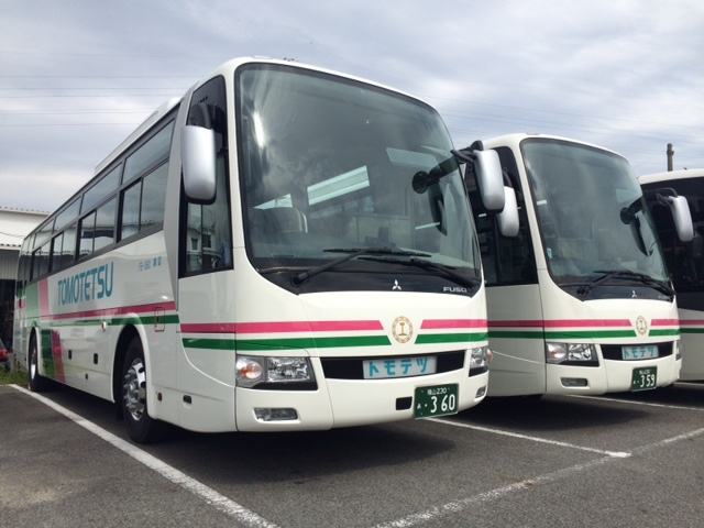 鞆鉄道の観光バス